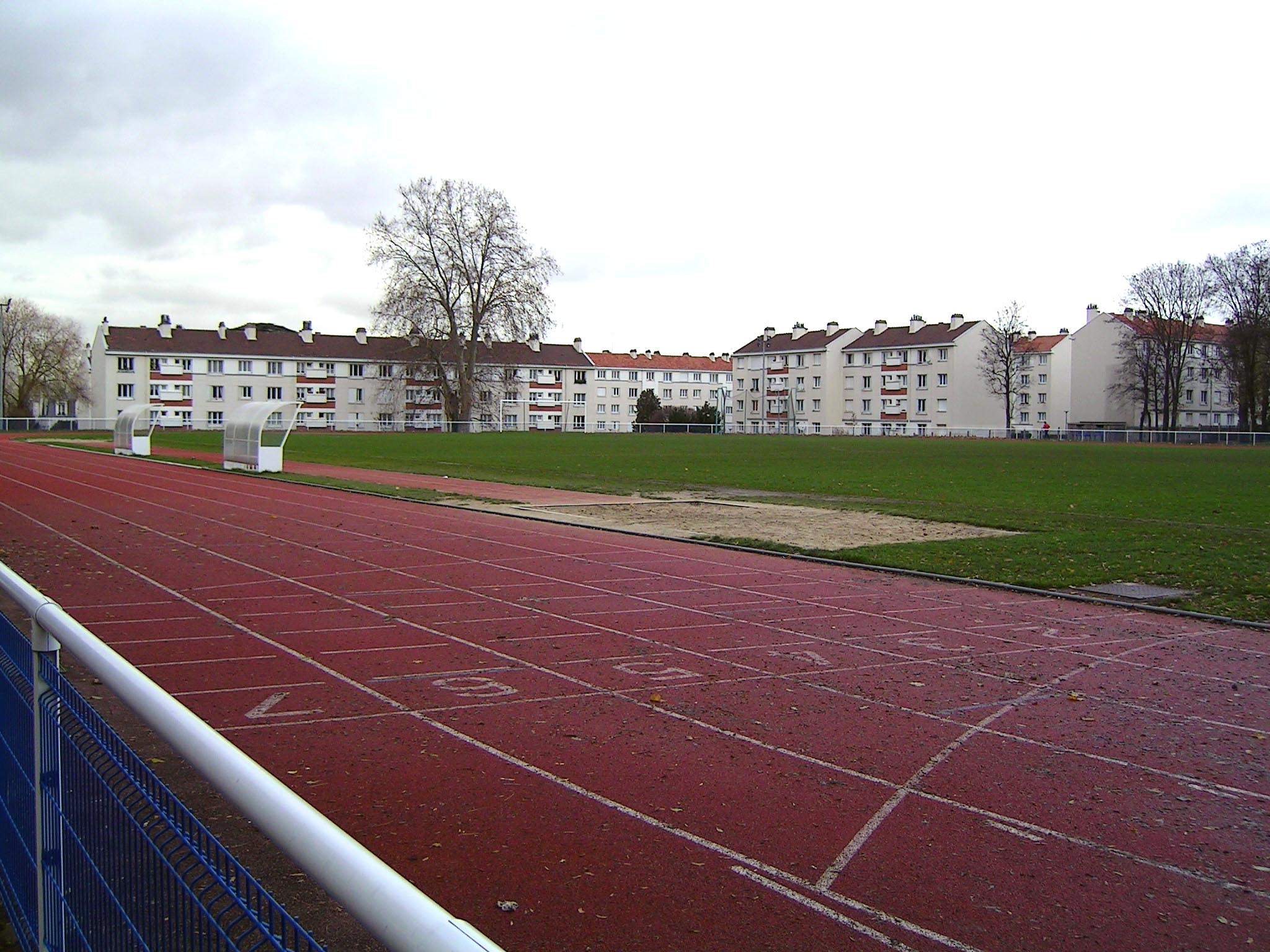 Livry-Gargan (France) - Le parc des sports Alfred-Marcel-Vincent - Décembre 2006 Photo personnelle (own work) de Marianna